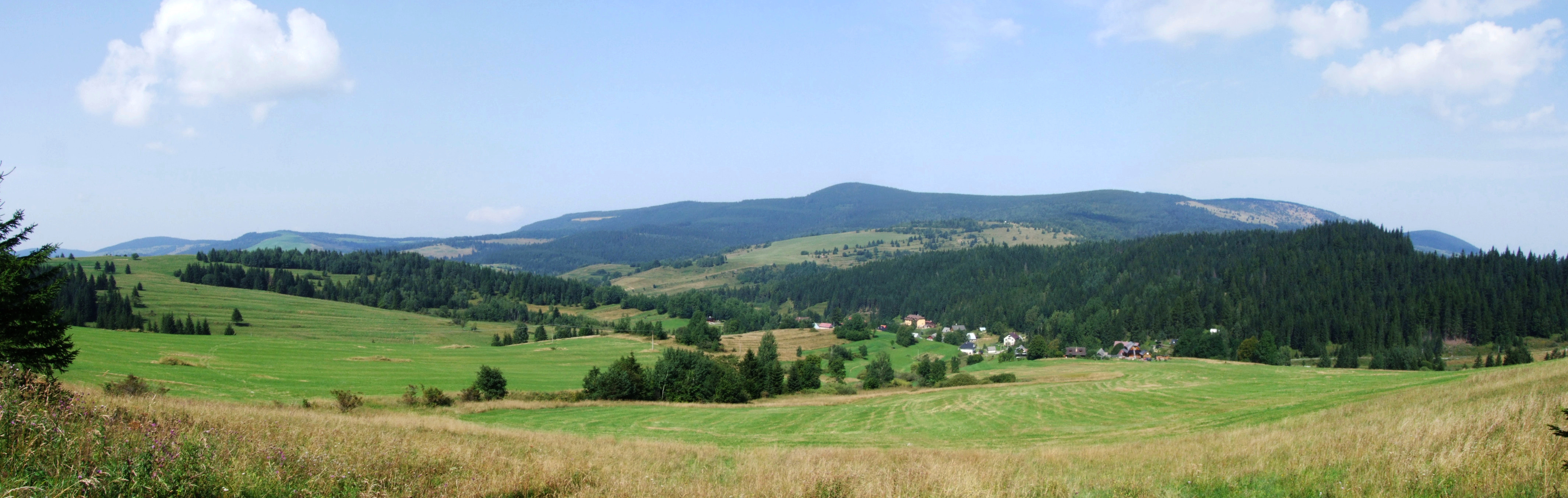 Widok z parkingu przy Wyżniej Huciańskiej Przełęczy na Pogórze Orawskie i Dolinę Huciańską